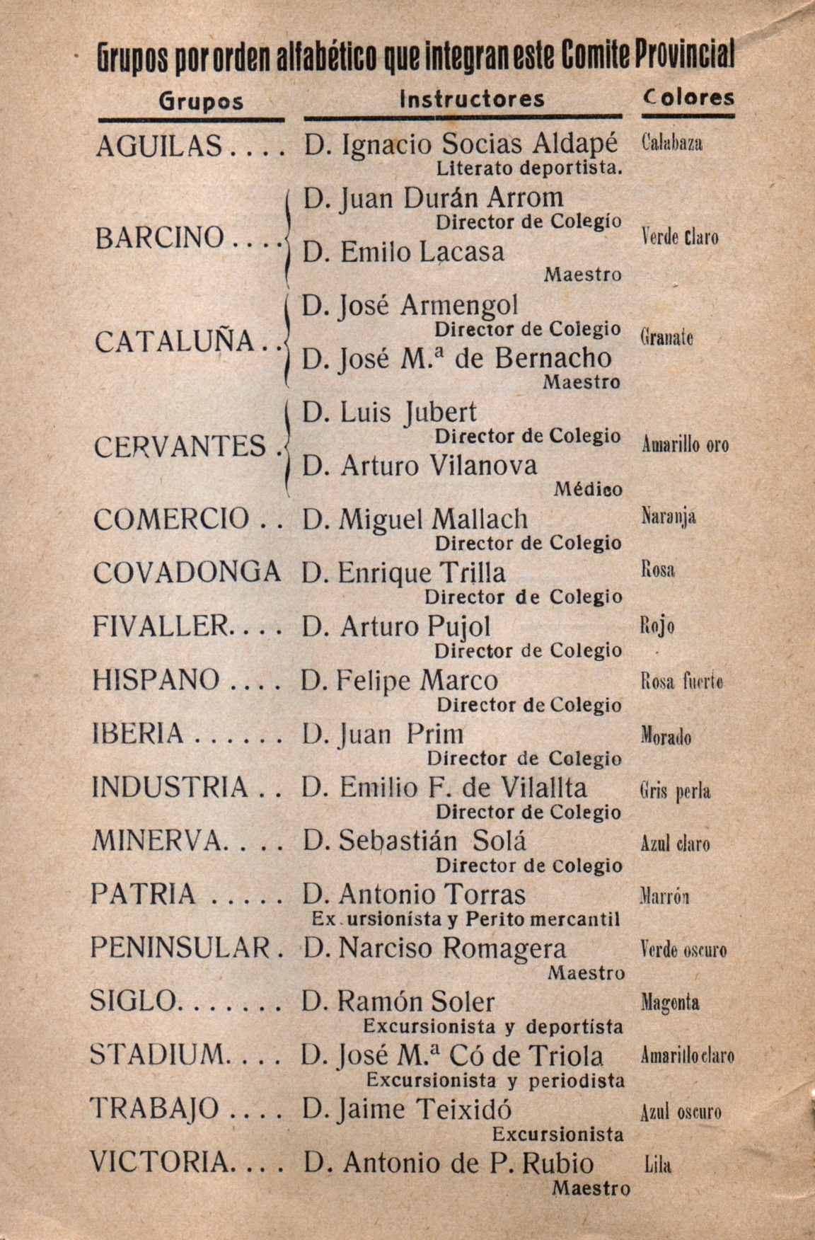 Contraportada de la cartilla del explorador donde aparecen los grupos de Exploradores Barceloneses y responsables adultos de cada uno (c. 1913)